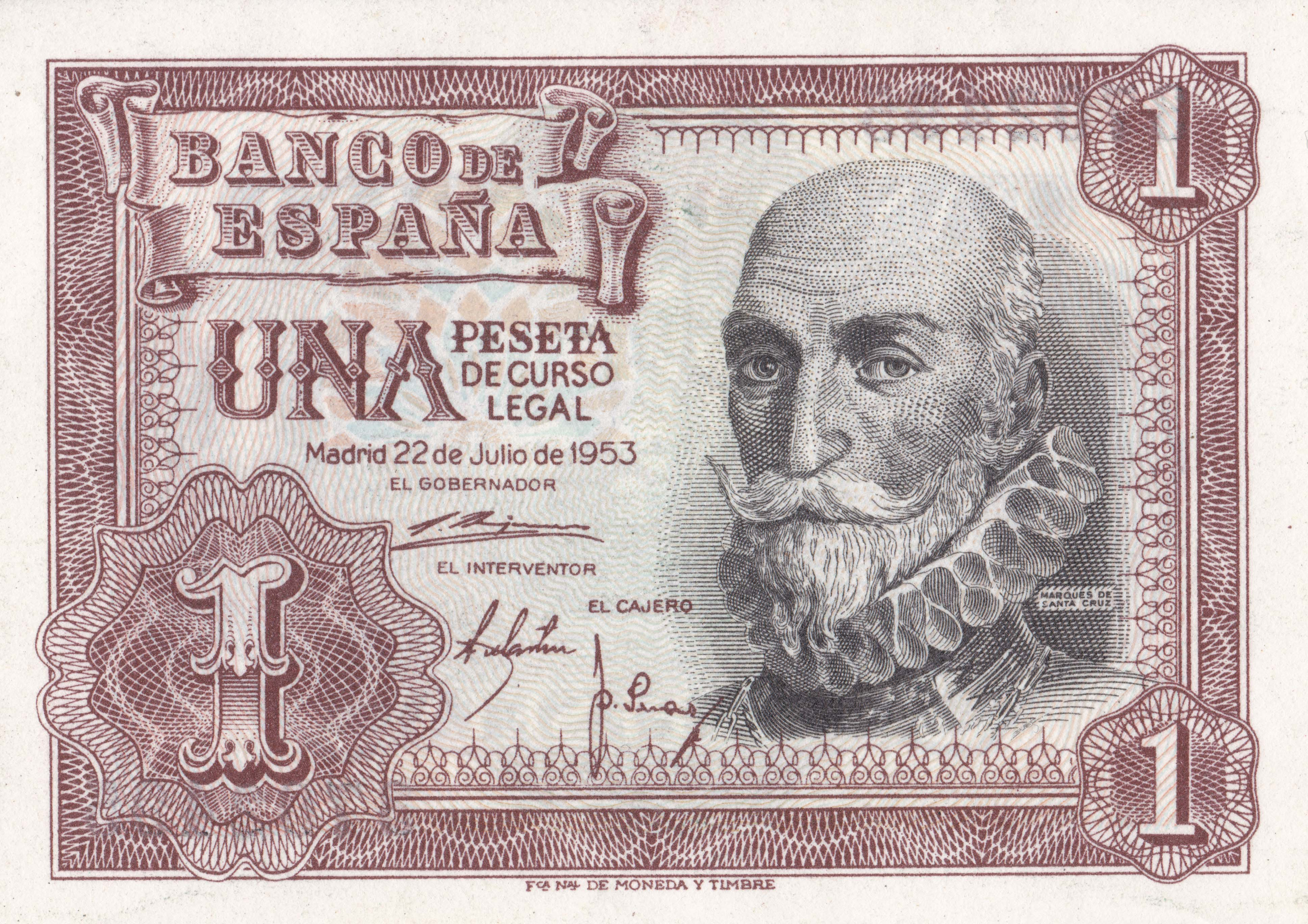 Avers: Marquis de Santa Cruz amiral de Philippe II à la bataille de Lépante Revers: Galion espagnol du xvie siècle